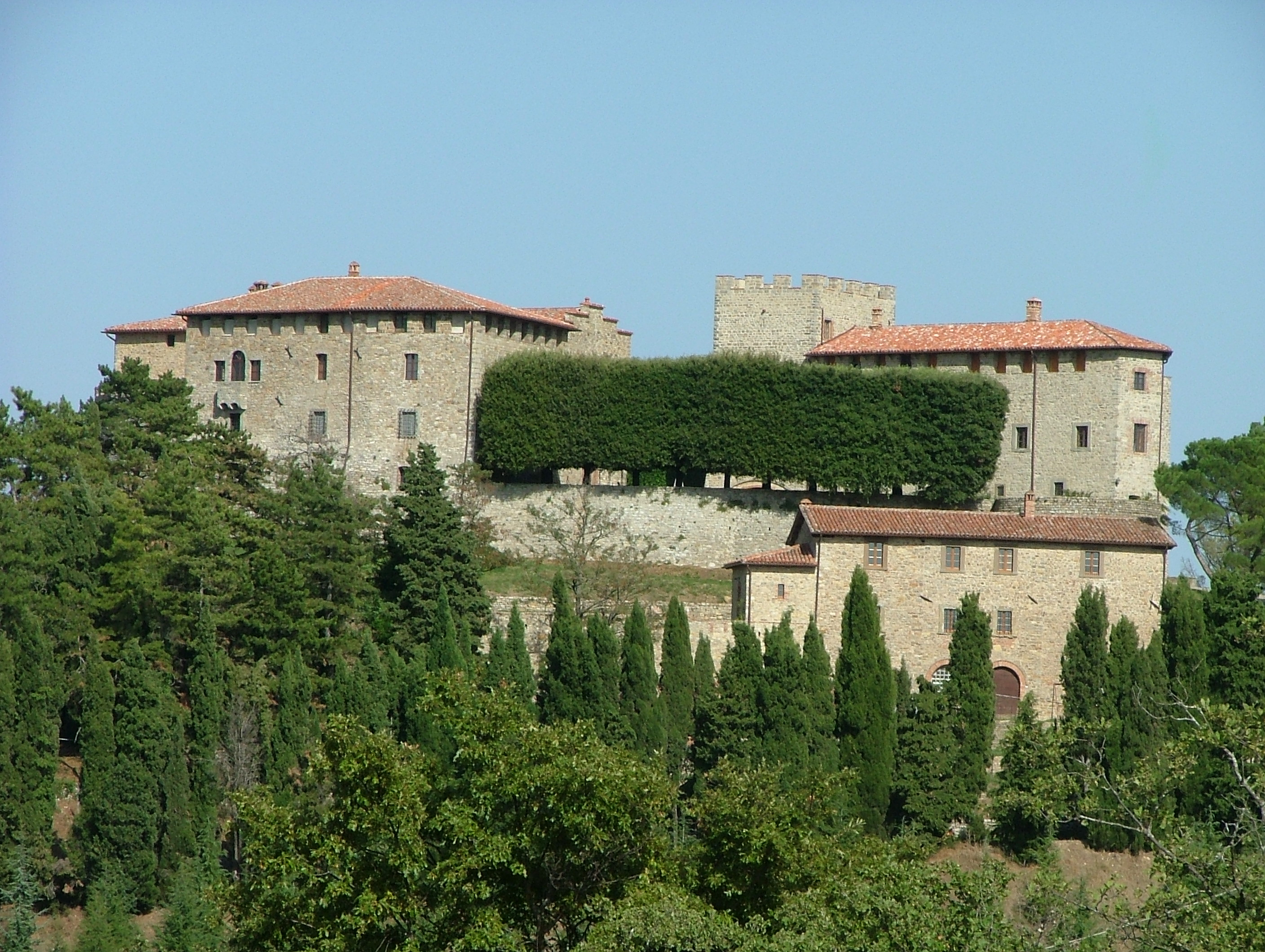 Castello di Montegiove - Montegabbione (TR) antico feudo dei conti di Marsciano